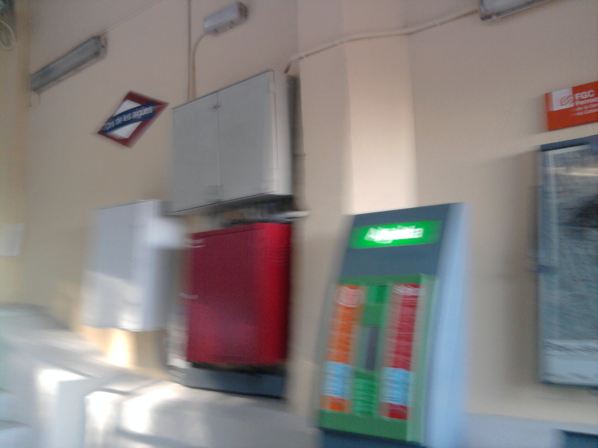 Foto capturada per la meva càmara a l'estació de Carretera de les Aigües (Funicular de Vallvidrera).